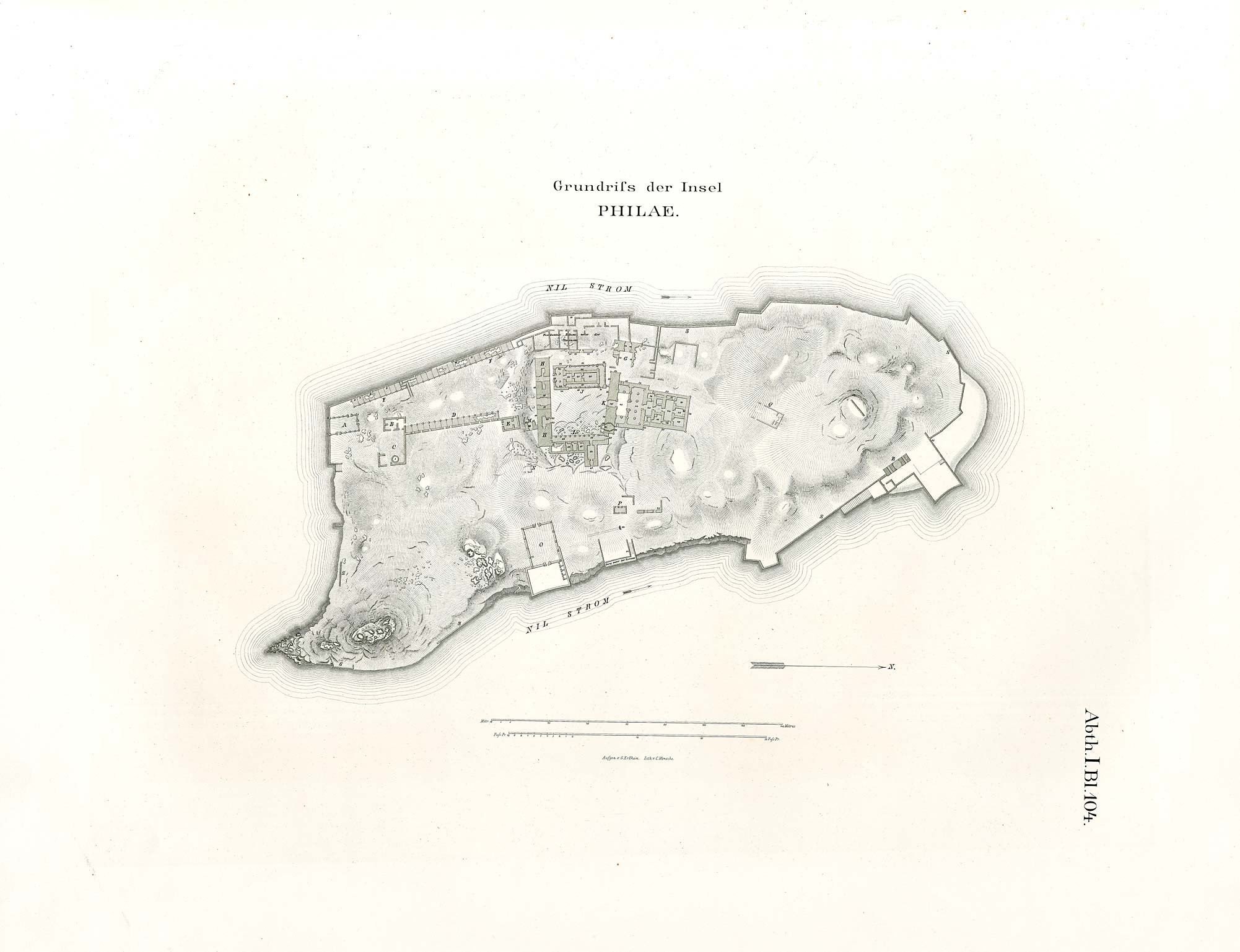 Denkmaeler aus Aegypten und Aethiopien nach den Zeichnungen der von Seiner Majestät dem Koenige von Preussen, Friedrich Wilhelm IV., nach diesen Ländern gesendeten, und in den Jahren 1842–1845 ausgeführten wissenschaftlichen Expedition auf Befehl Seiner Majestät